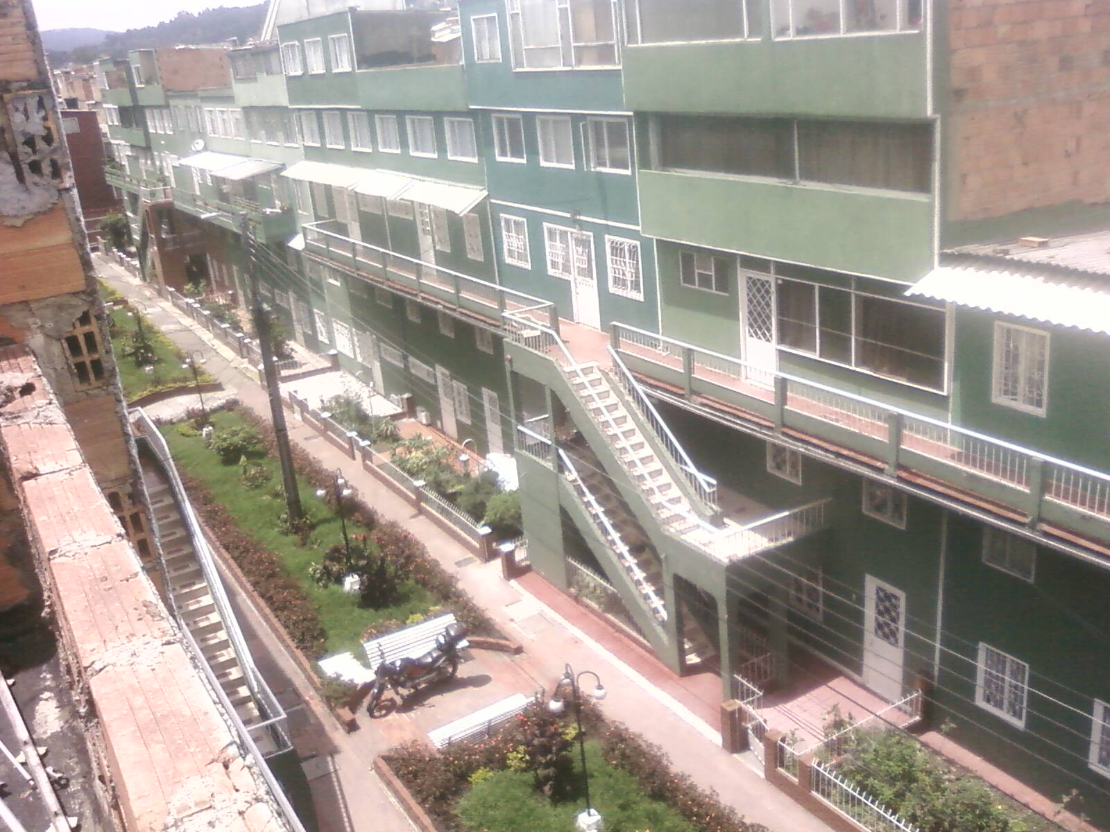 Fotografía del modelo arquitectónico del barrio